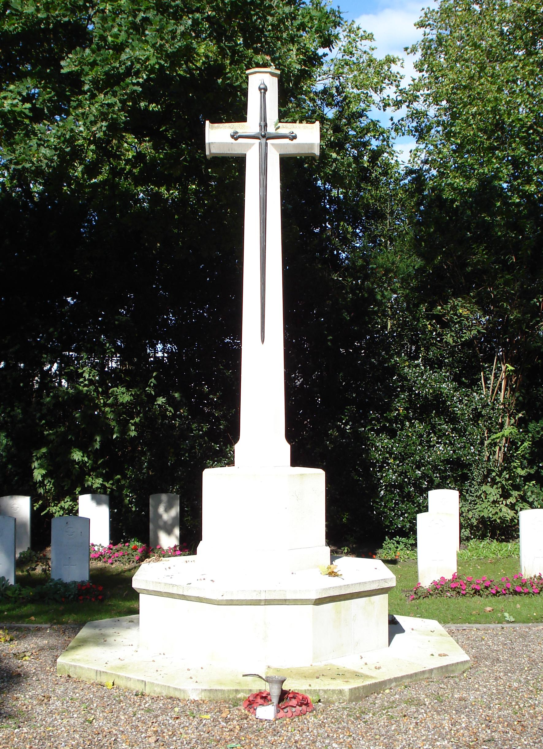 Rotterdam Crooswijk, begraafplaats. Monument geallieerde militairen, met Engels kruis. Rotterdam/The Netherlands.